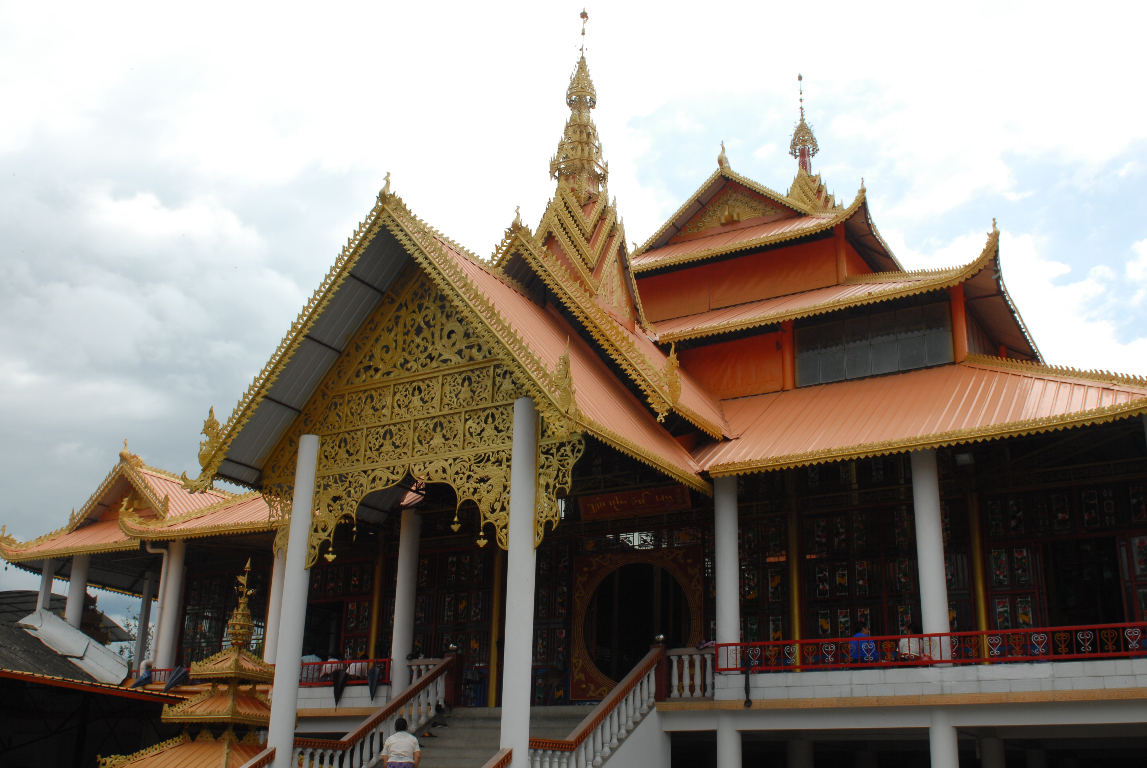 中文（中国大陆）: 芒市镇遮安银寺（奘房）